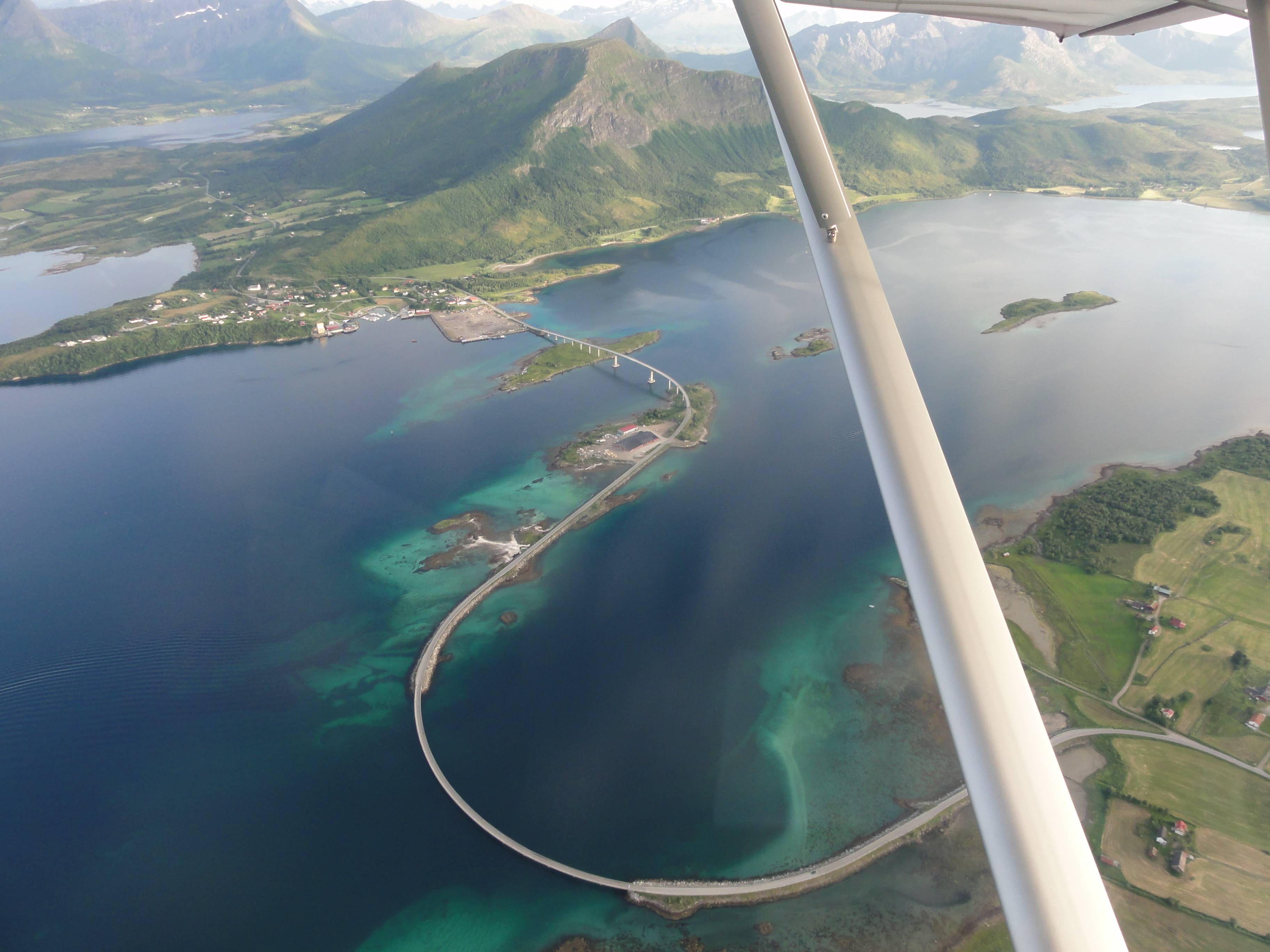 Engeløybruene forbinder Engeløya til fastlandet i Steigen kommune i Nordland.